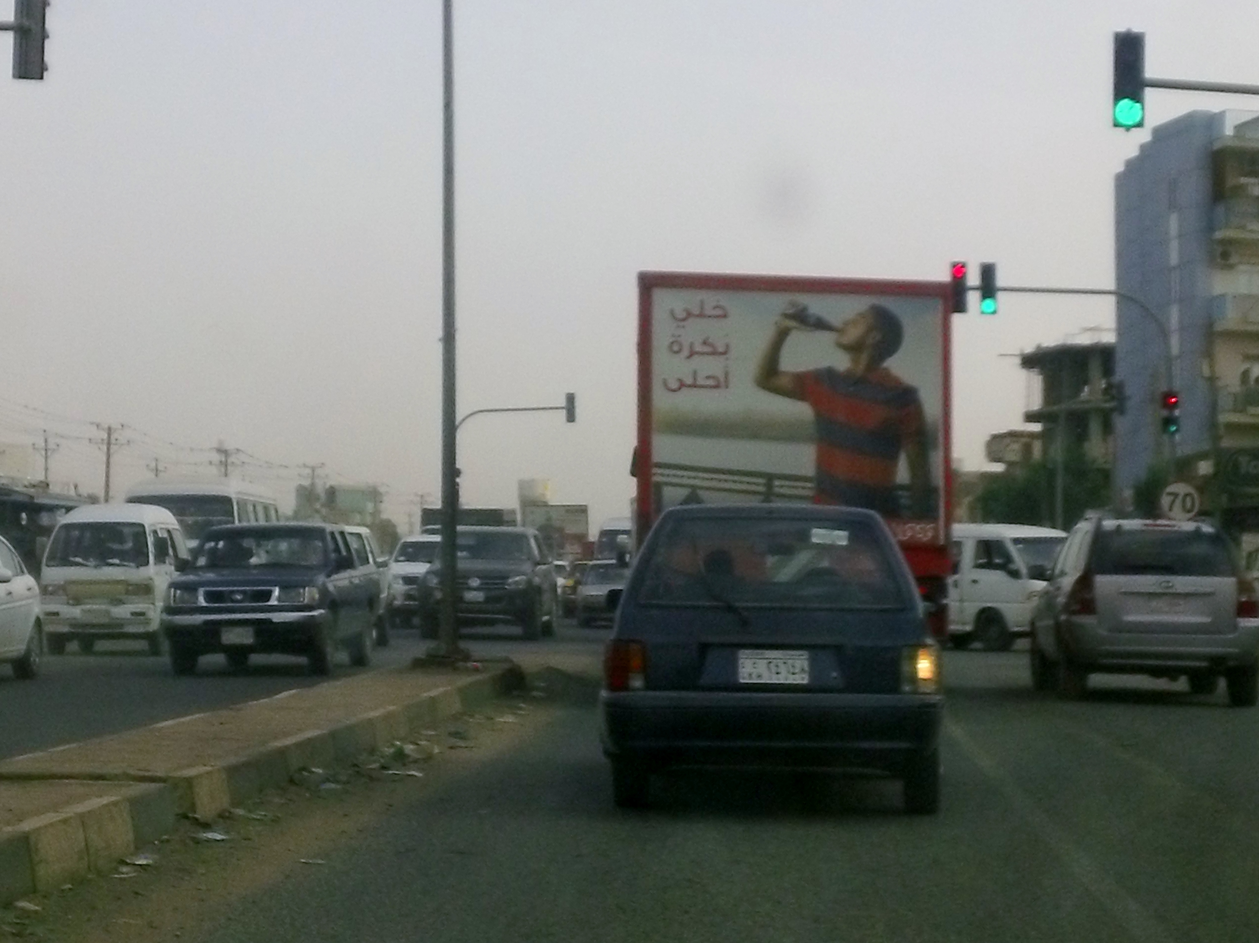 Aliengaz Road - Khartoum Bahari - Sudan